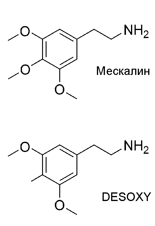 Сравнительное изображение мескалина и DESOXY.